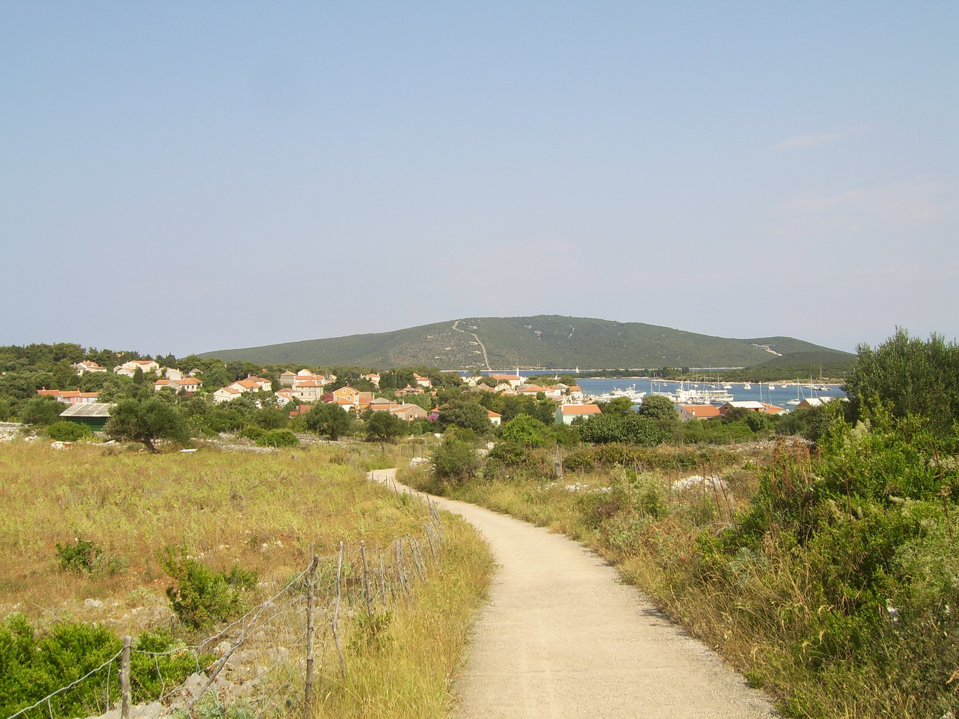 Mjesto Ilovik. Desno se vidi otok Sveti Petar, a između Ilovika i Svetog Petra istoimeni kanal. U pozadini je otok Lošinj.